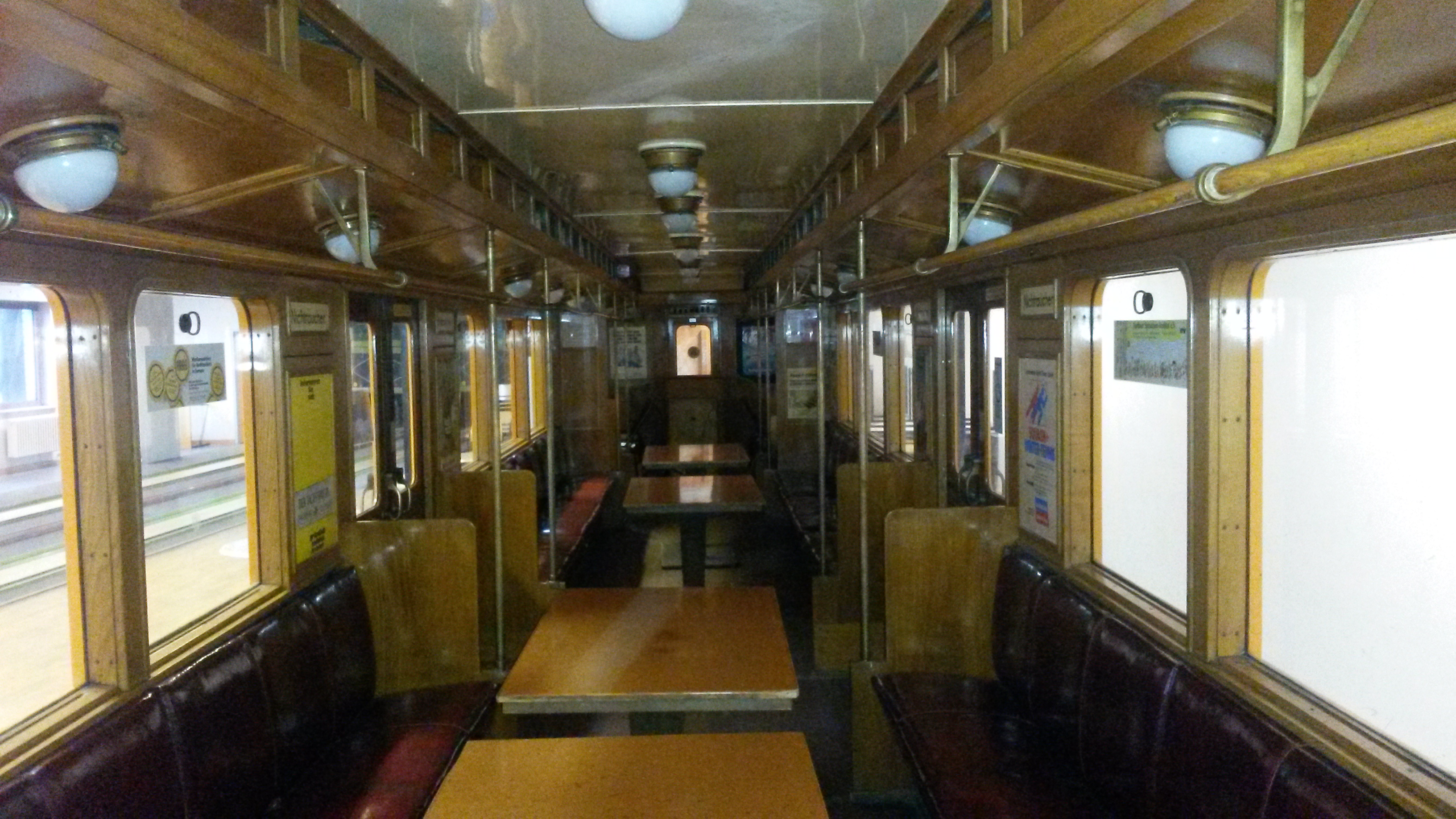 Innenraum U-Bahnwagen